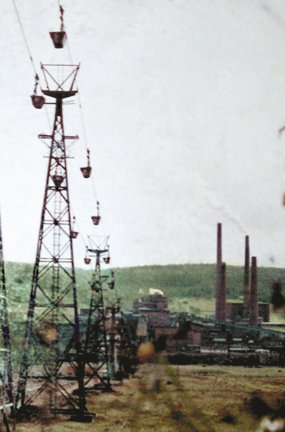 Kaliseilbahn zum Werk Dorndorf um 1960